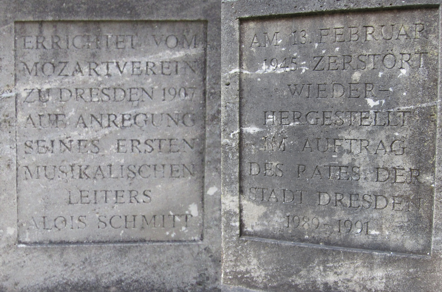 Informationstafeln an der linken und der rechten Seite des Mozartbrunnens auf der Bürgerwiese in Dresden